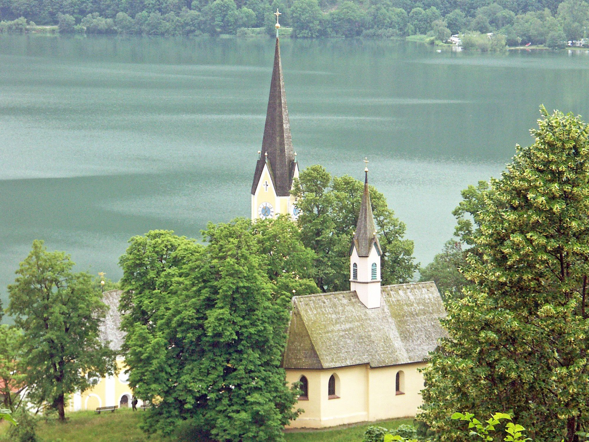 Die Kirche St. Georg am Weinberg in Schliersee, dahinter St. Sixtus vor dem Schliersee